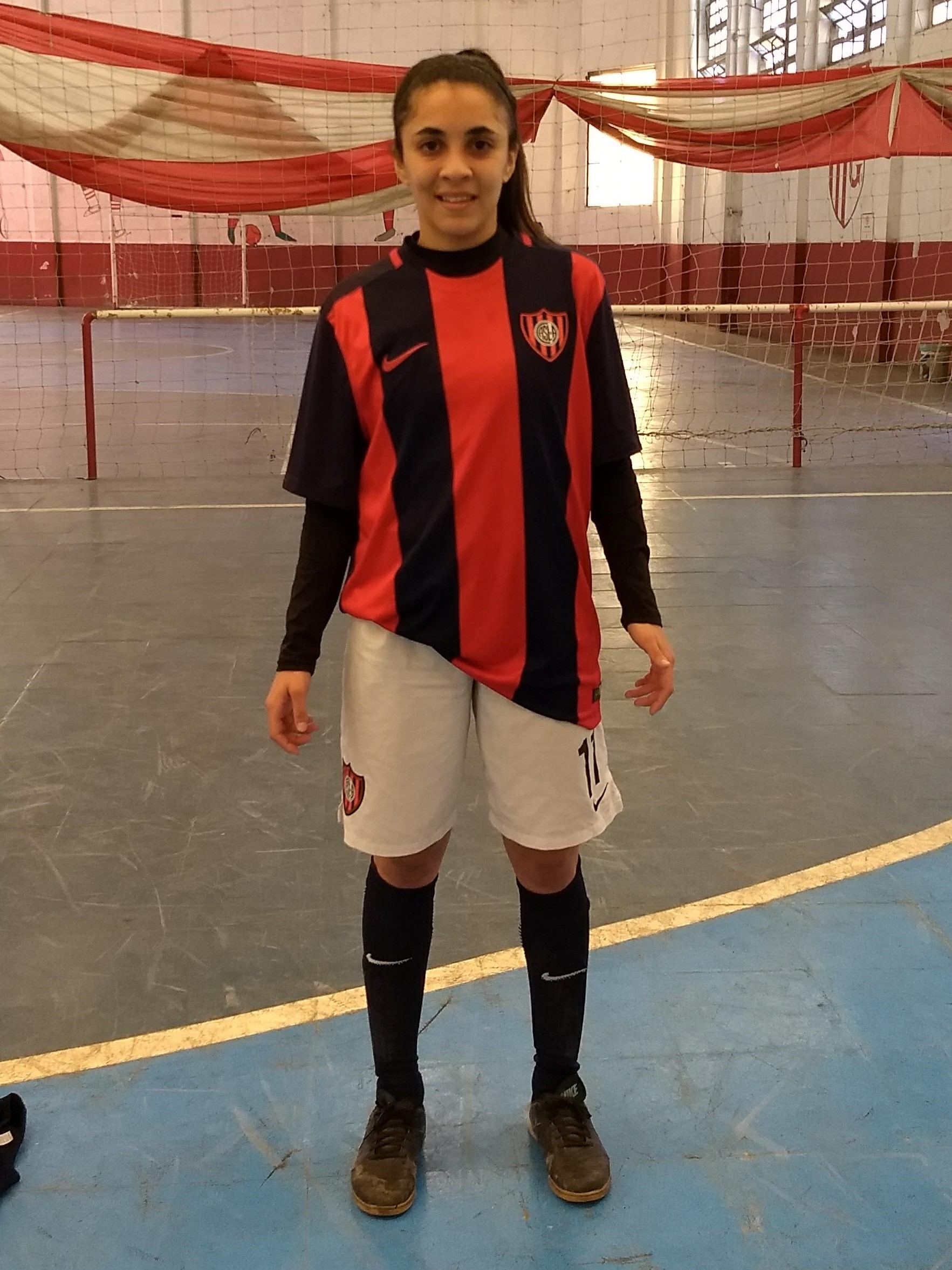 Jugadora de futsal femenino de San Lorenzo luego de un partido frente a Glorias de Tigre.